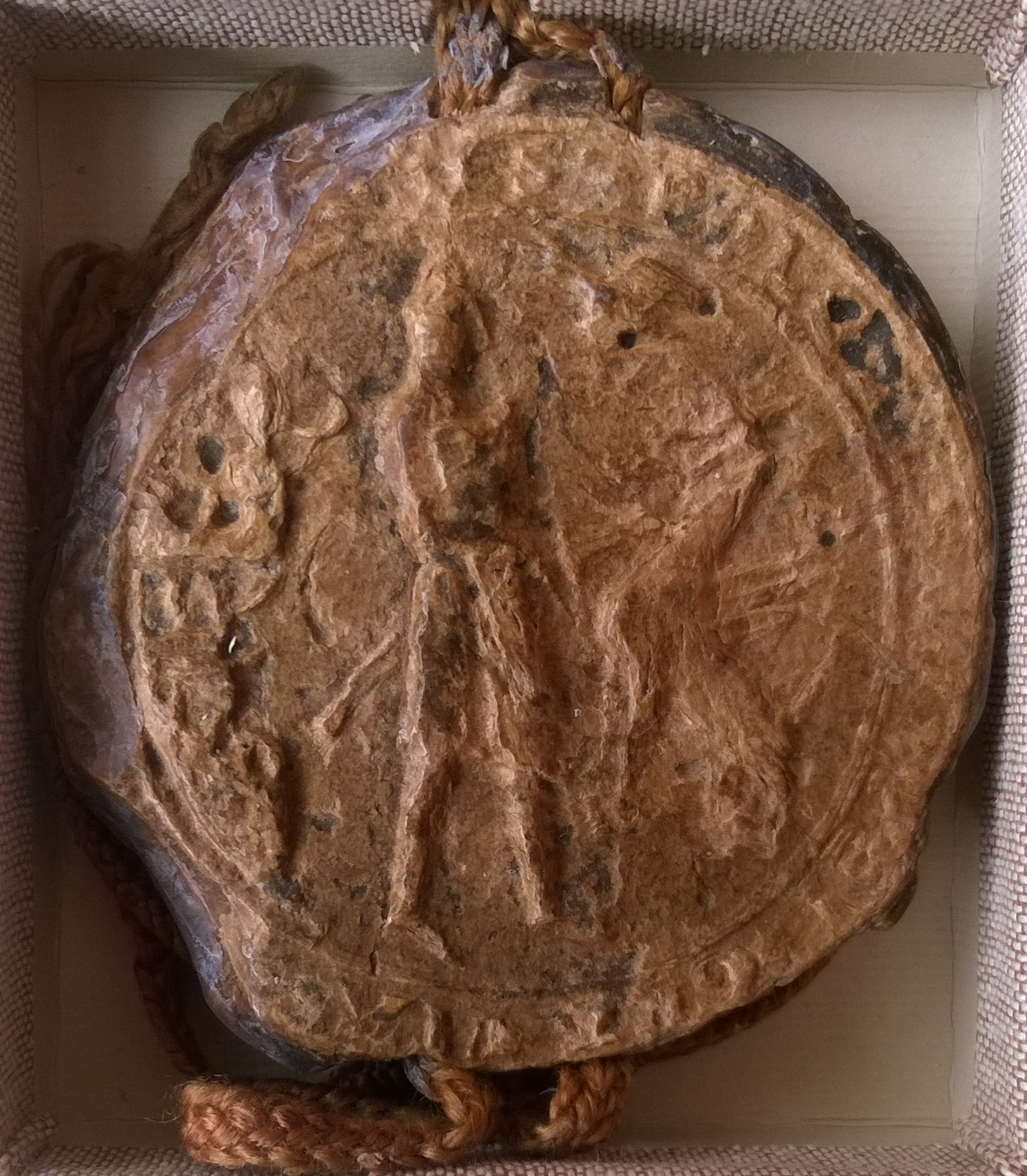 Pieczęć na jedwabnej, różowej, wąskiej taśmie, uszkodzona. Pieczęć dołączona do dokumentu.